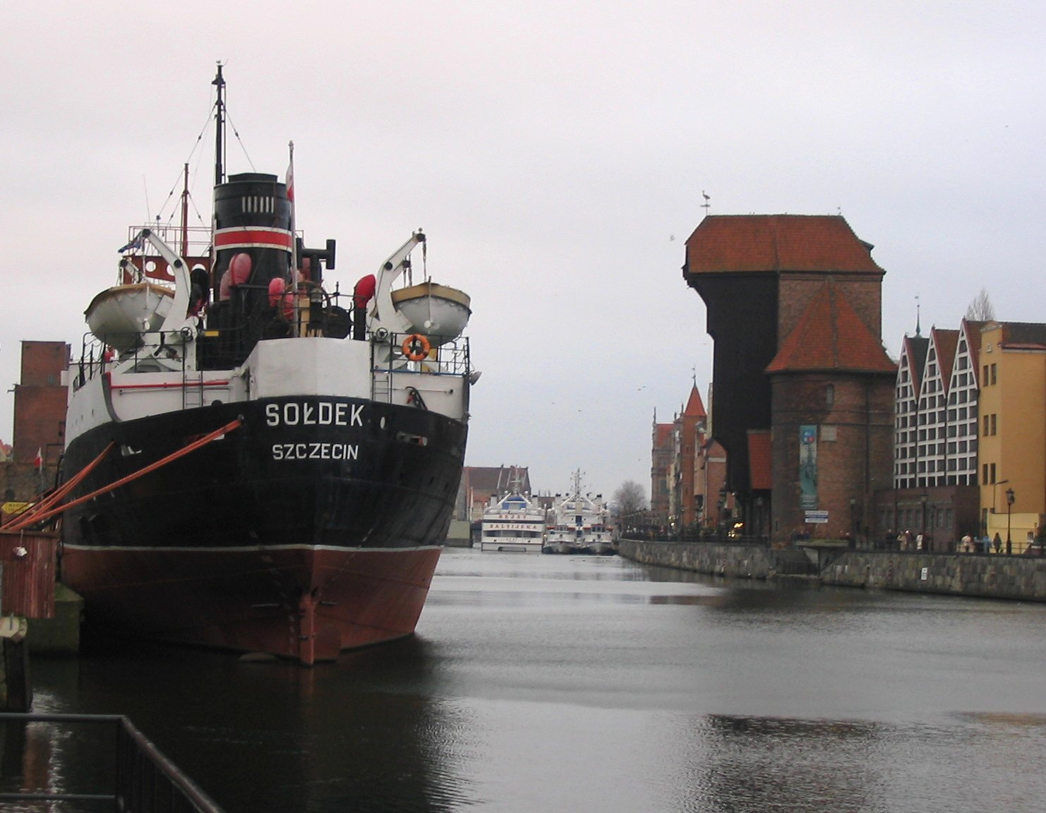 Gdańsk, Motława - statek-muzeum Sołdek i historyczny Żuraw